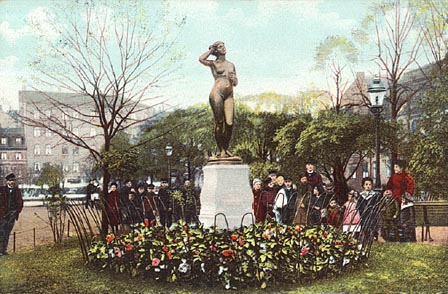 Vykort Stockholm "ca 1902". Ev vid invigningen 1900?